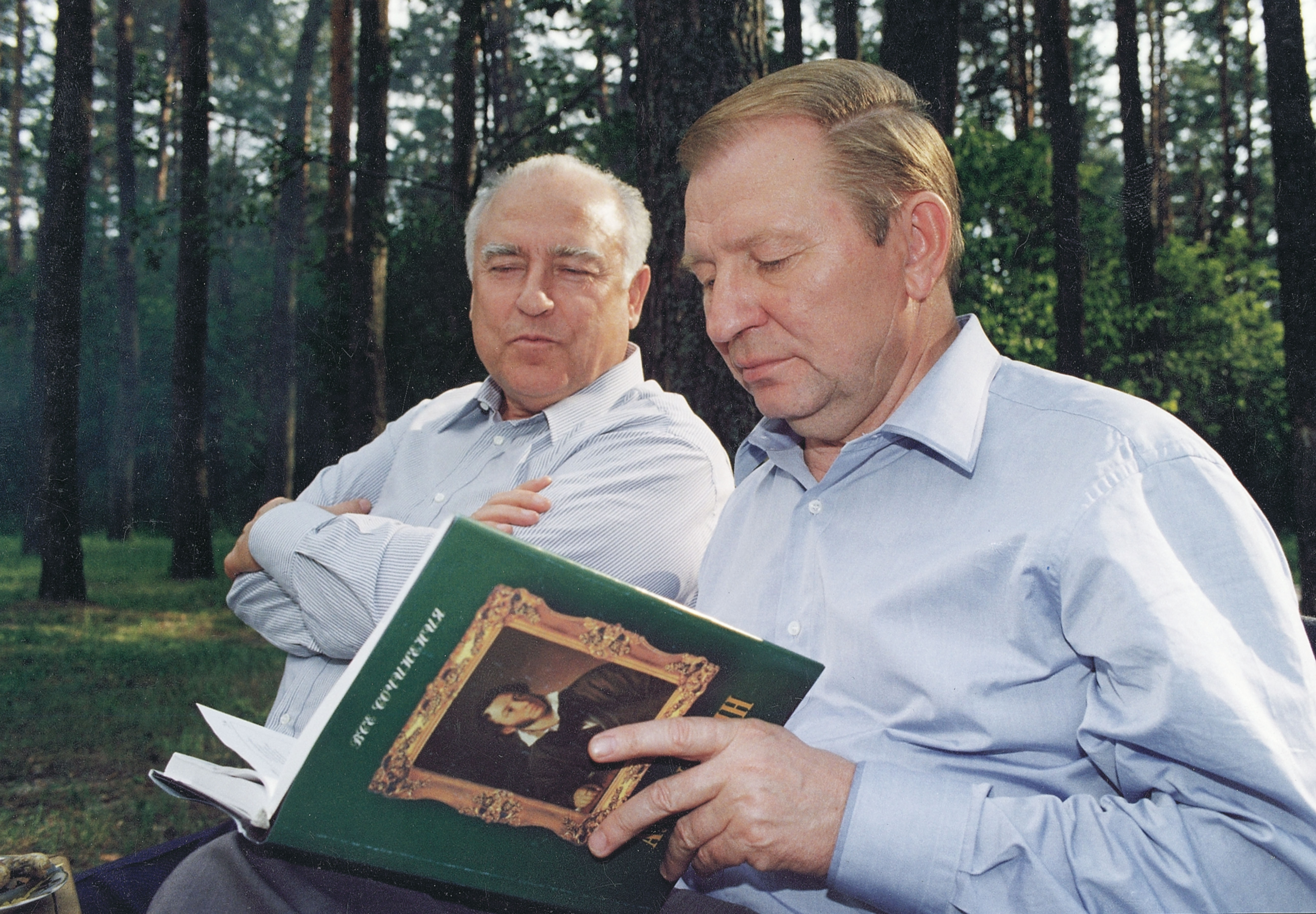 Киев. Август 1999 г. Виктор Степанович Черномырдин, Александр Сергеевич Пушкин, Леонид Данилович Кучма.